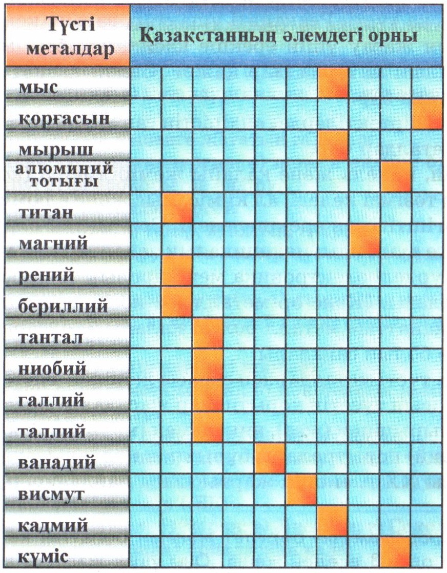 Қазақстан металл тізімі.